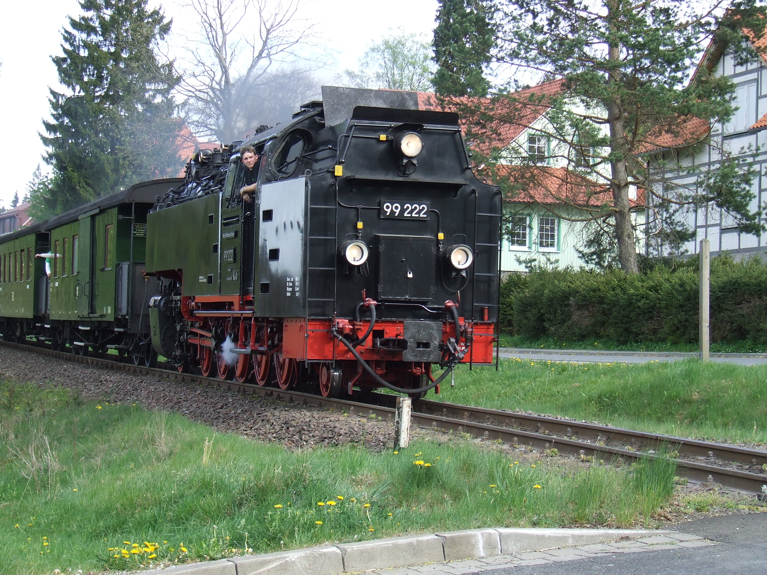 99 222 kurz vor Hp Sorge